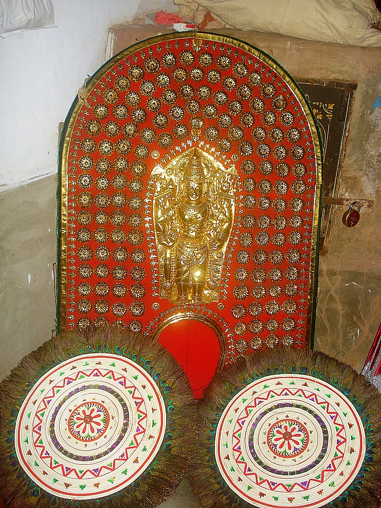 കൂടമാണിക്യത്തപ്പൻറെ കോലം ഉത്സവത്തിനു വേണ്ടി മിനുക്കൂന്നു. പണിപ്പുരയിൽ..